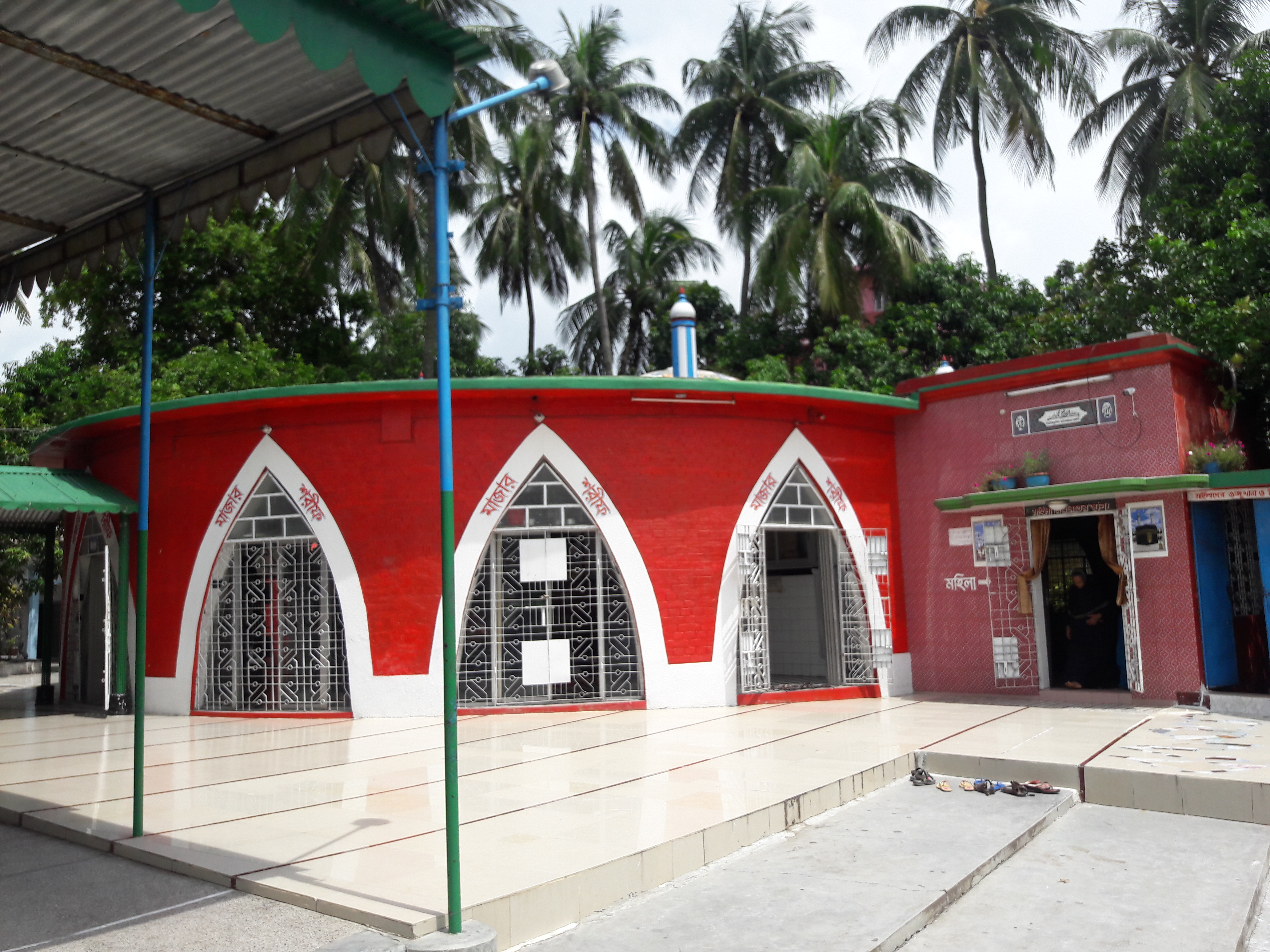 Shah Makhdum Dargah Majar